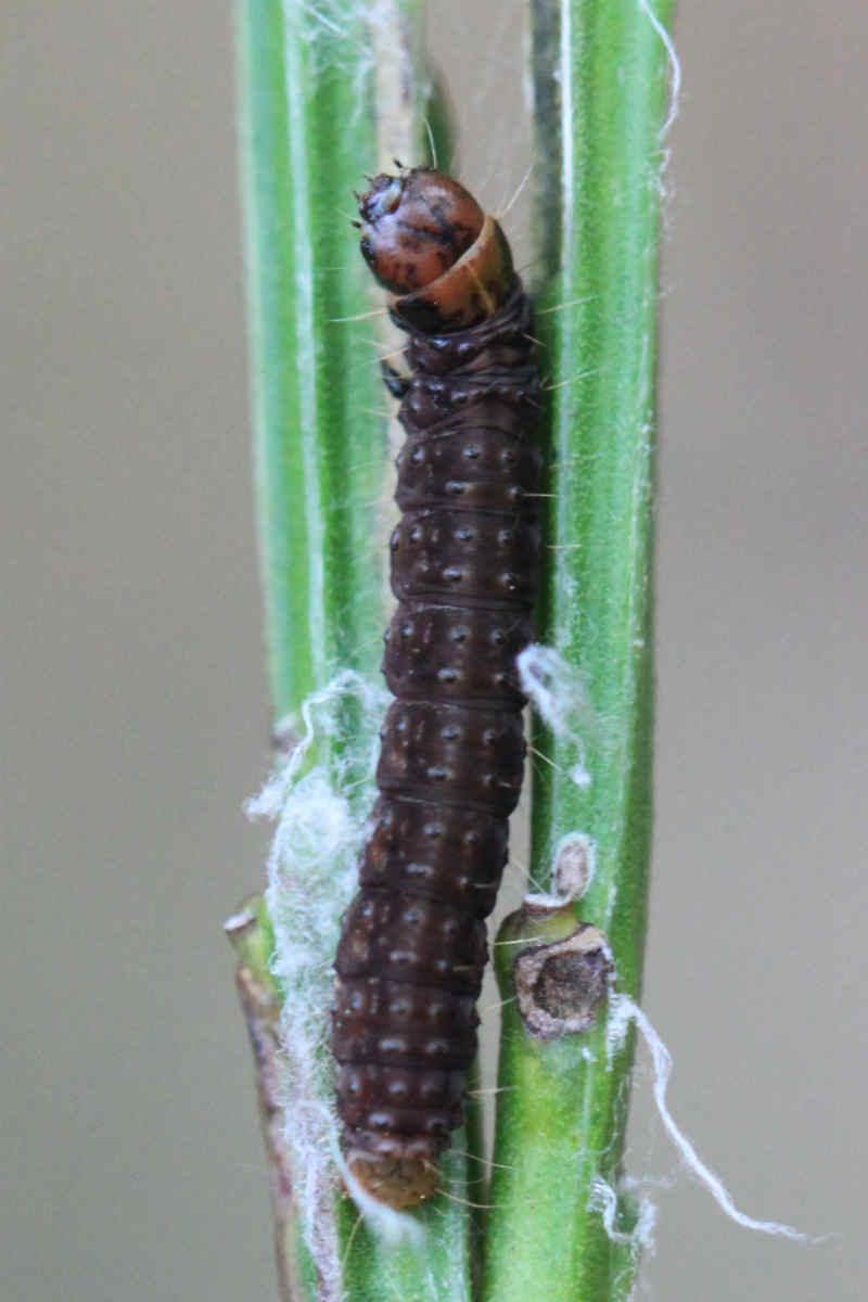 Agonopterix assimilella, am 29.03.2017 an Besenginster in der Schwetzinger Hardt